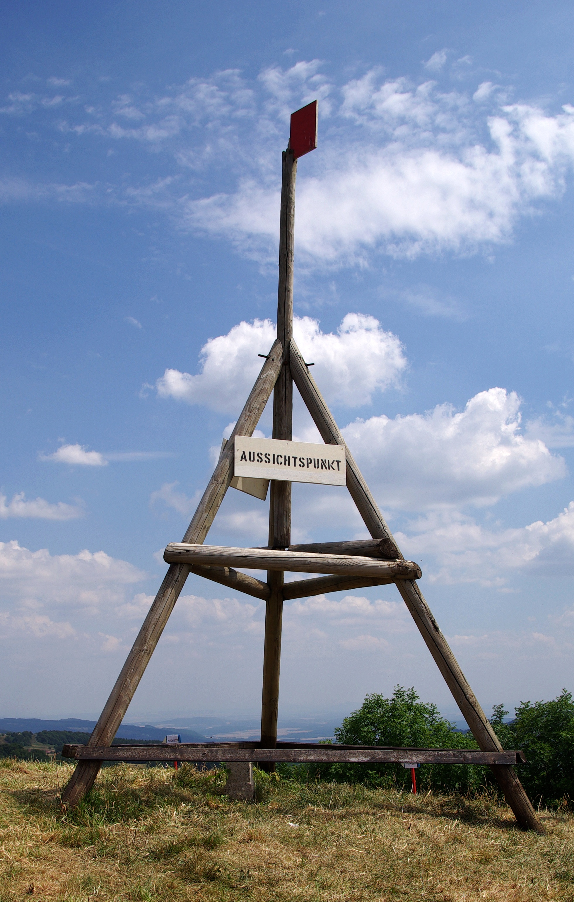 Der trigonometrische Punkt am Eierhauck im Truppenübungsplatz Wildflecken in der Rhön